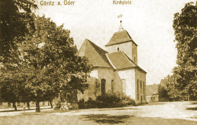 Kościół w Górzycy (przełom XIX i XX wieku)